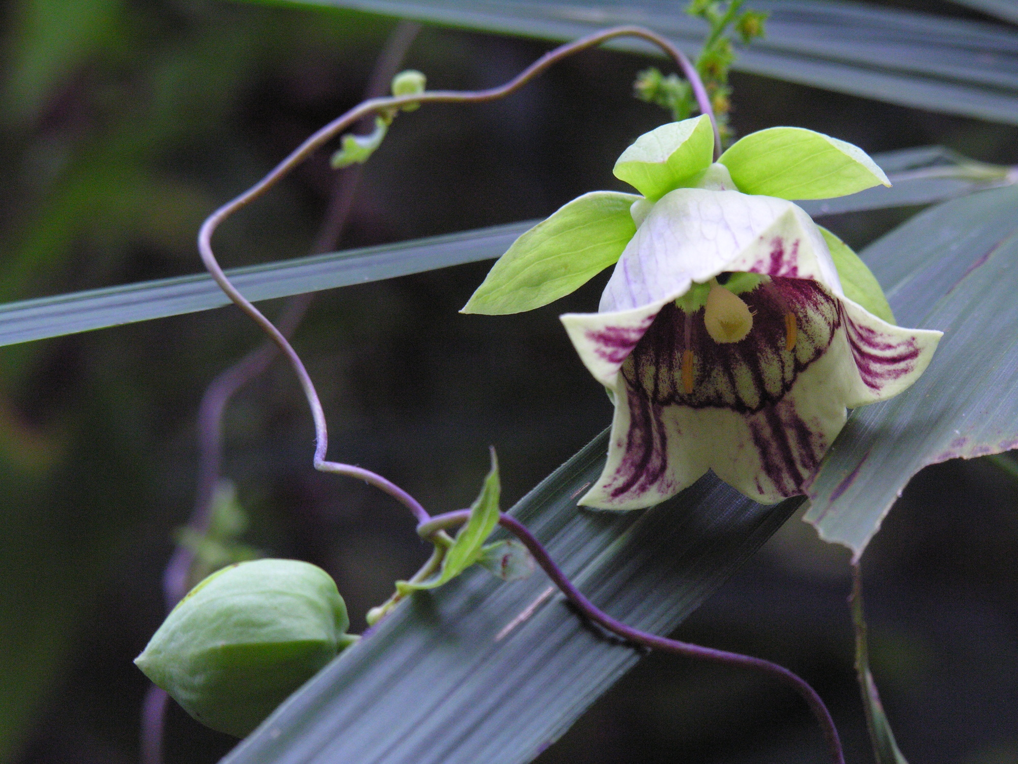 Codonopsis lanceolata